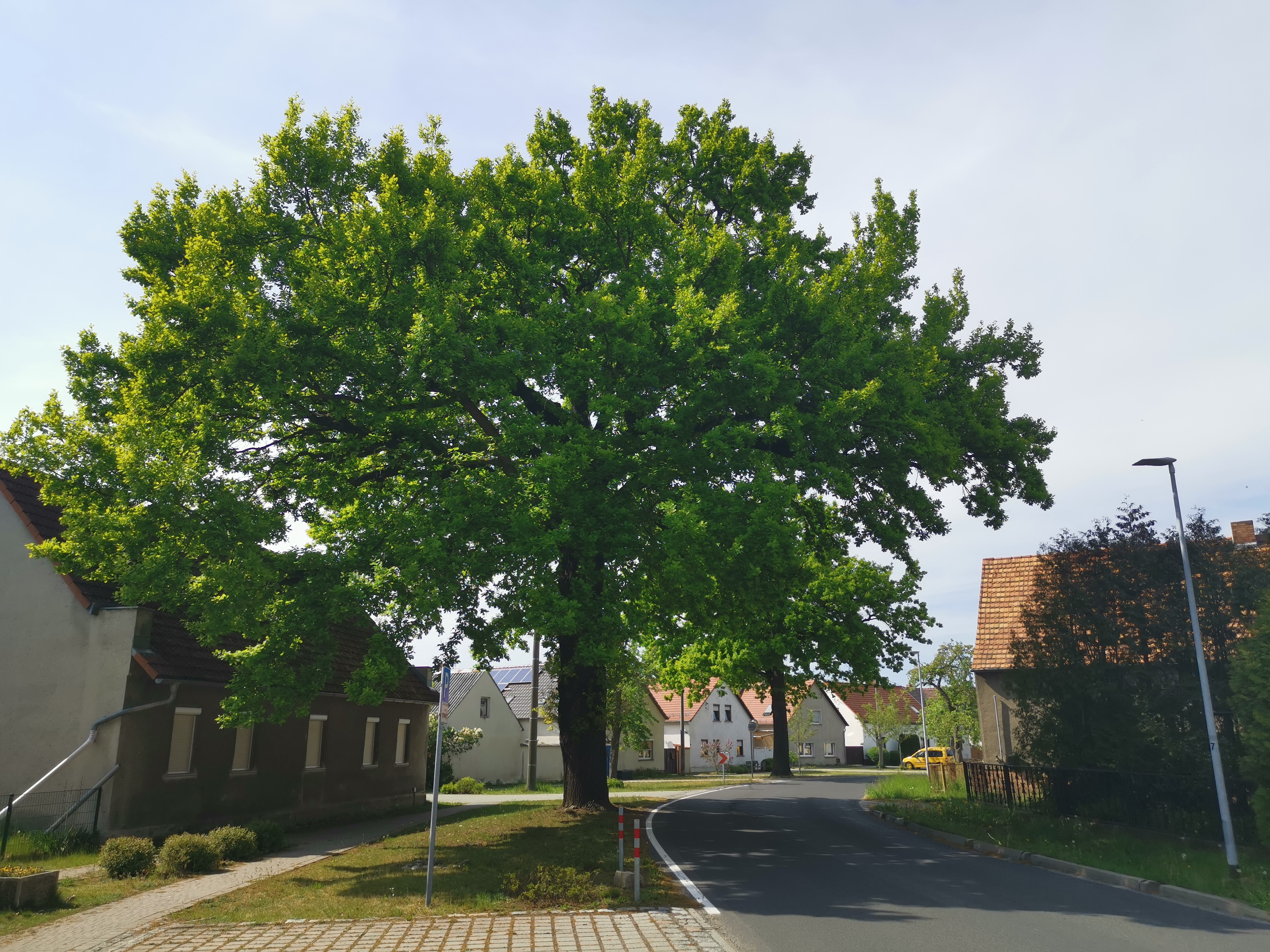 Als Naturdenkmal geschützte Stieleiche in Schwarzbach